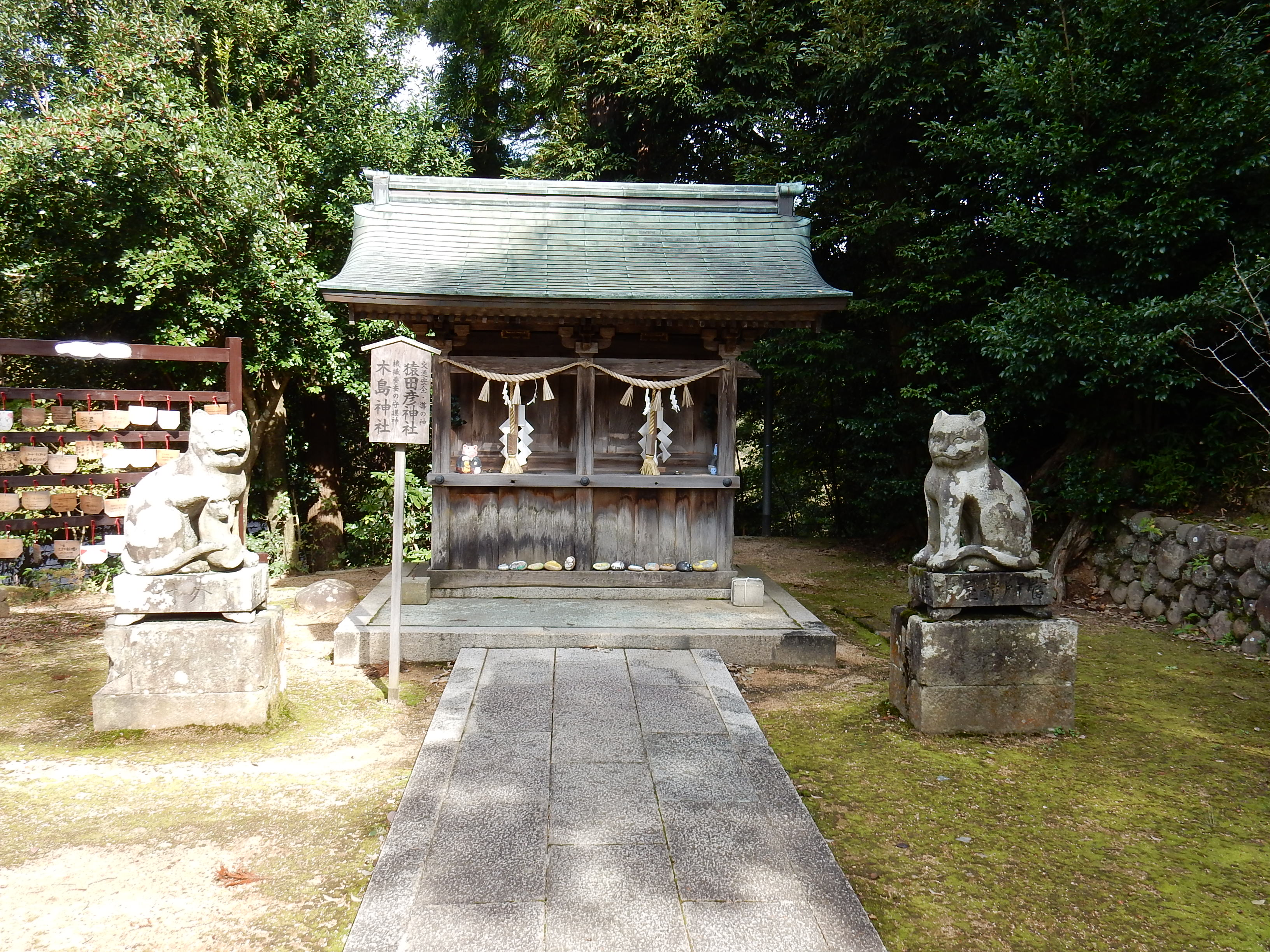 京丹後市峰山町泉に所在する金刀比羅神社の末社。神前には狛犬ならぬ「狛猫」が奉納されている。